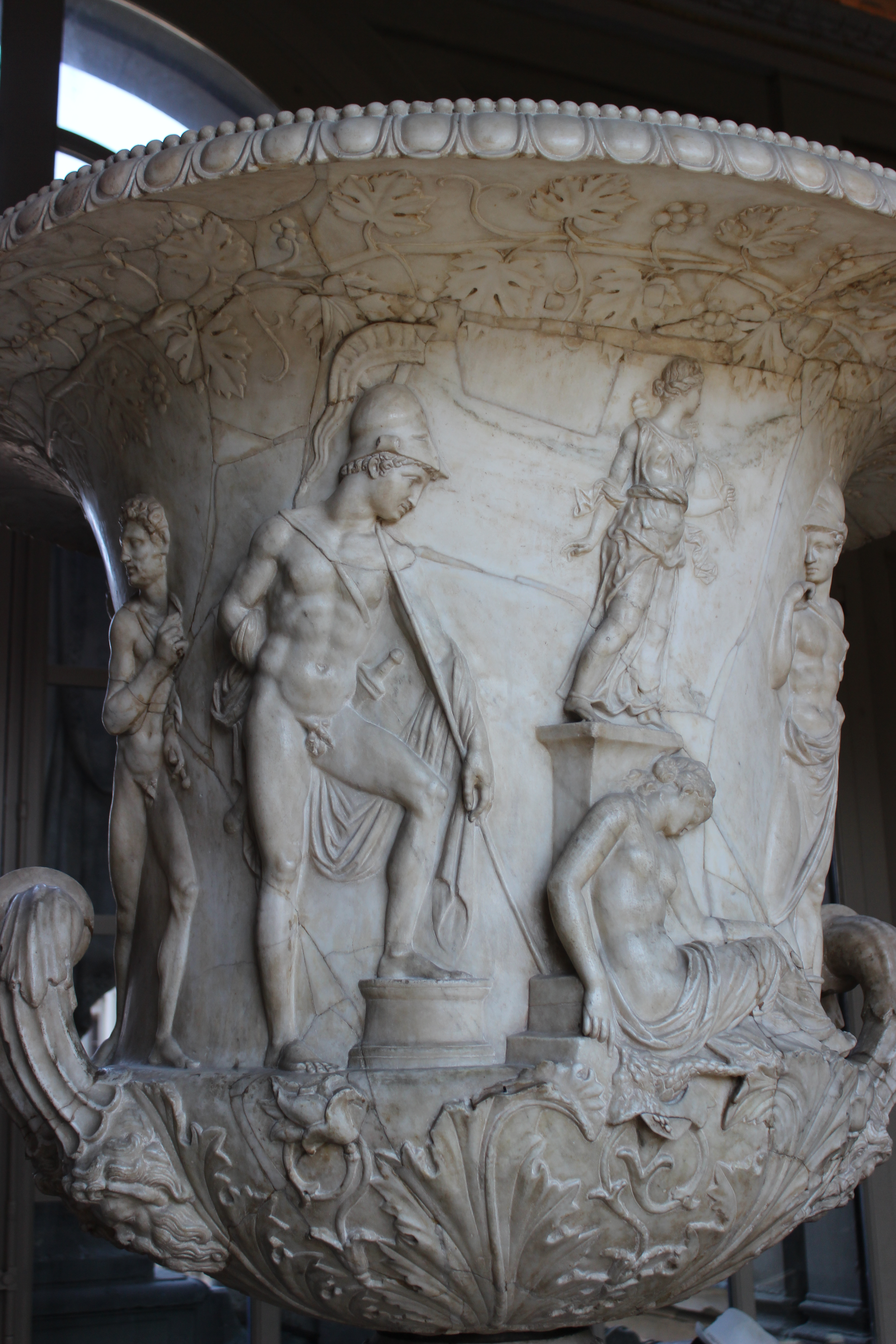 Vaso Medici. Uffizi.